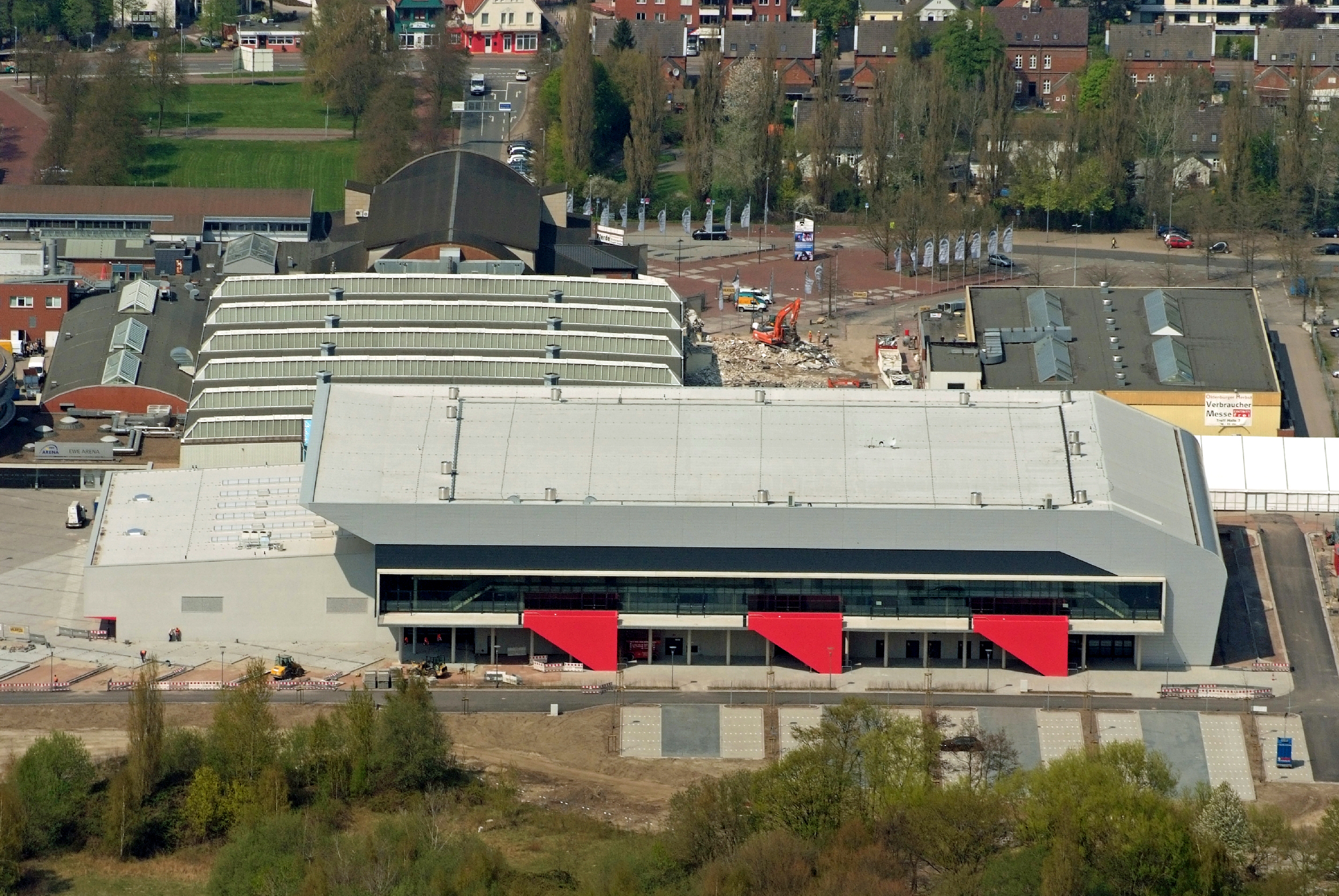 Fotoflug von Nordholz-Spieka nach Oldenburg und Papenburg